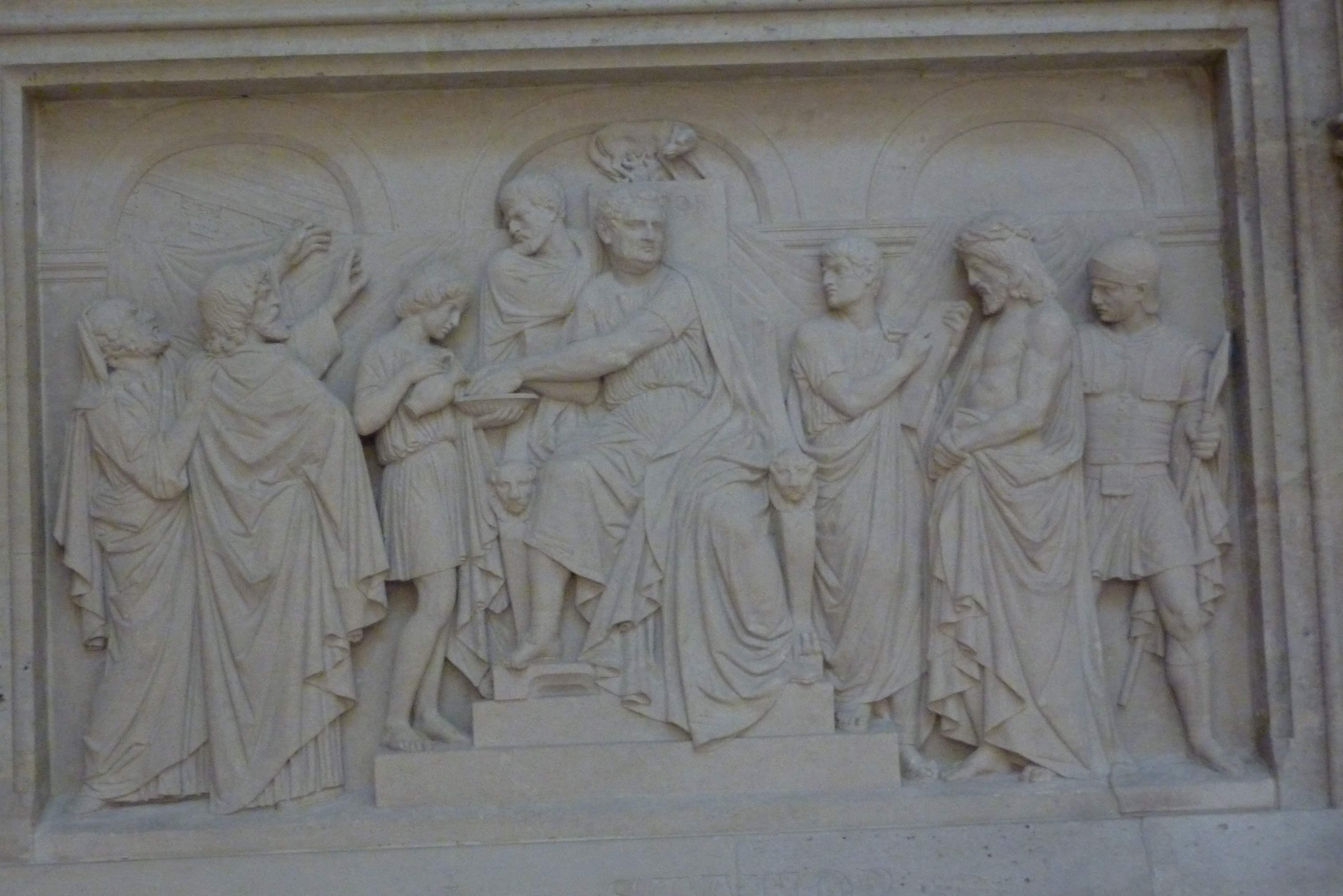 katholische Pfarrkirche Sainte Clotilde in Paris, Kreuzweg